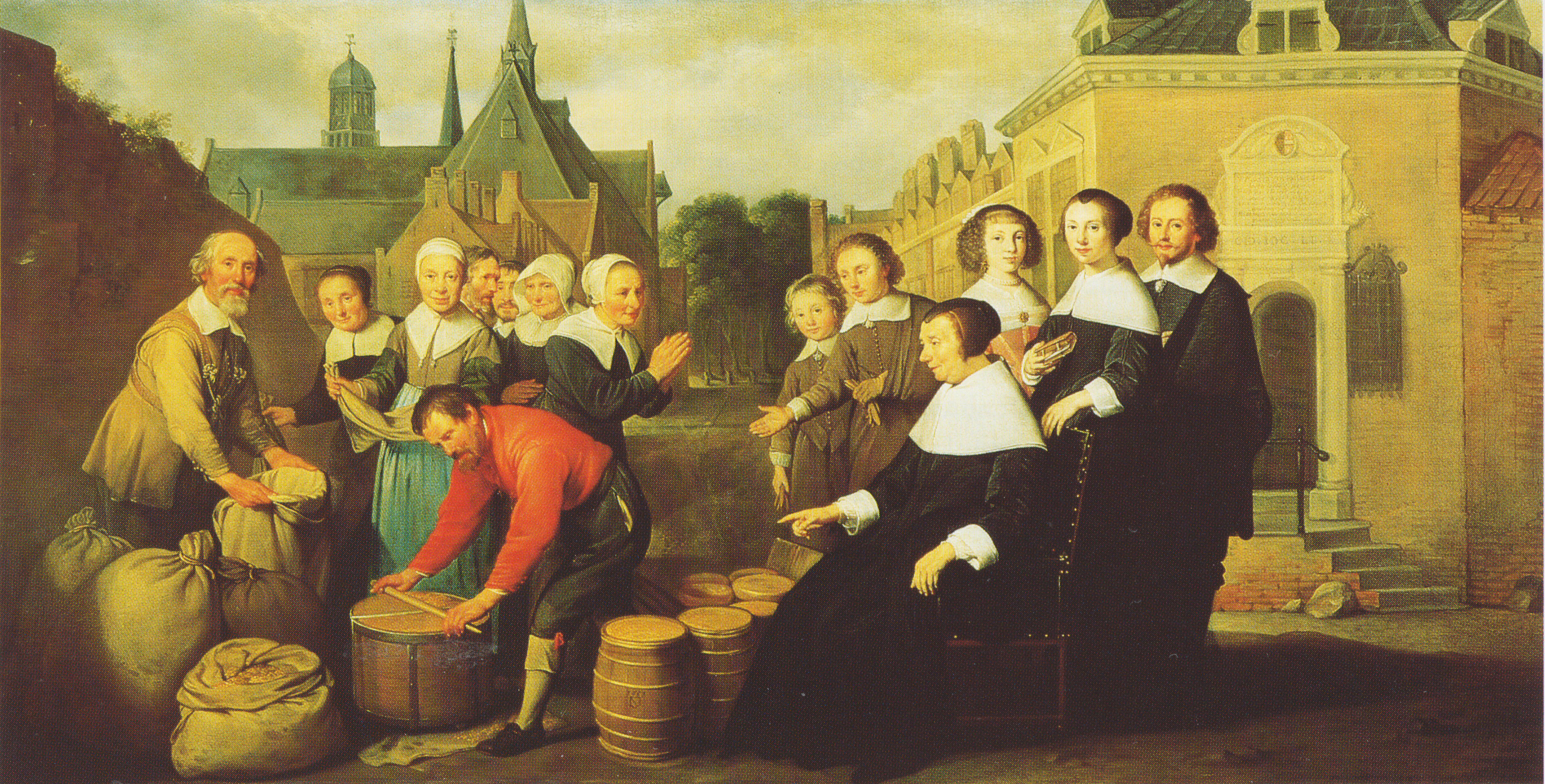 De jaarlijkse voedseluitdeling aan de armen door Maria van Pallaes. In de achtergrond de Kameren Maria van Pallaes op de hoek Nieuwegracht/Agnietenstraat te Utrecht. Geschilderd door Hendrick Bloemaert, olieverf op doek, 1657.